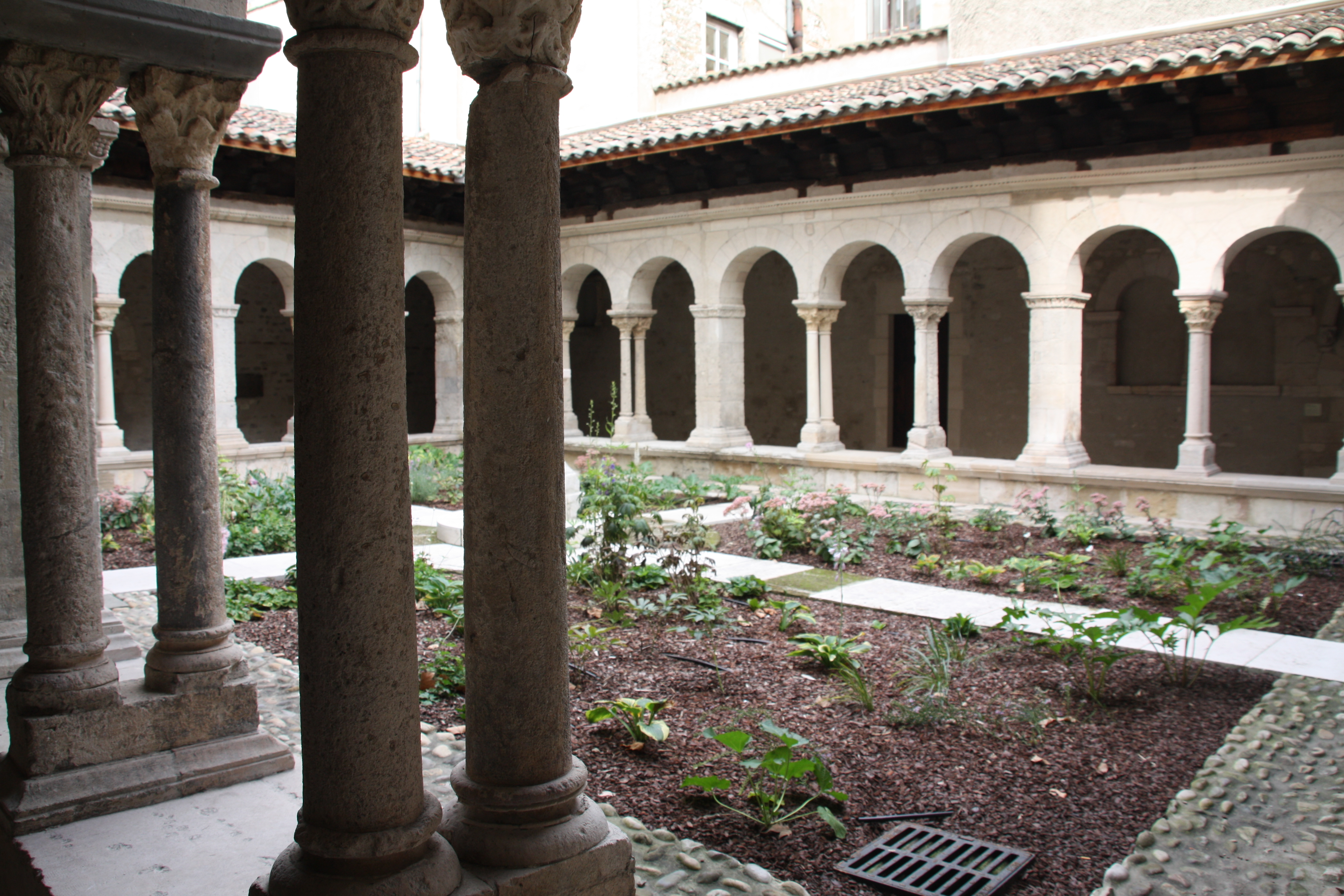 Cloître Saint-André-le-Bas à Vienne, Isère, France .